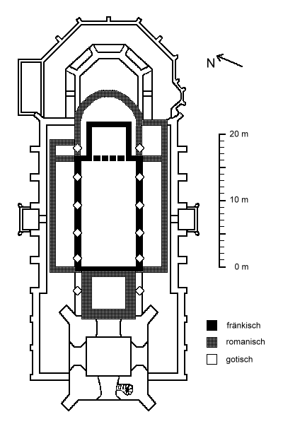 Schematischer Grundriss der Lambertuskirche zu Erkelenz nach den Angaben von P.A. Tholen und H.J. Kamp